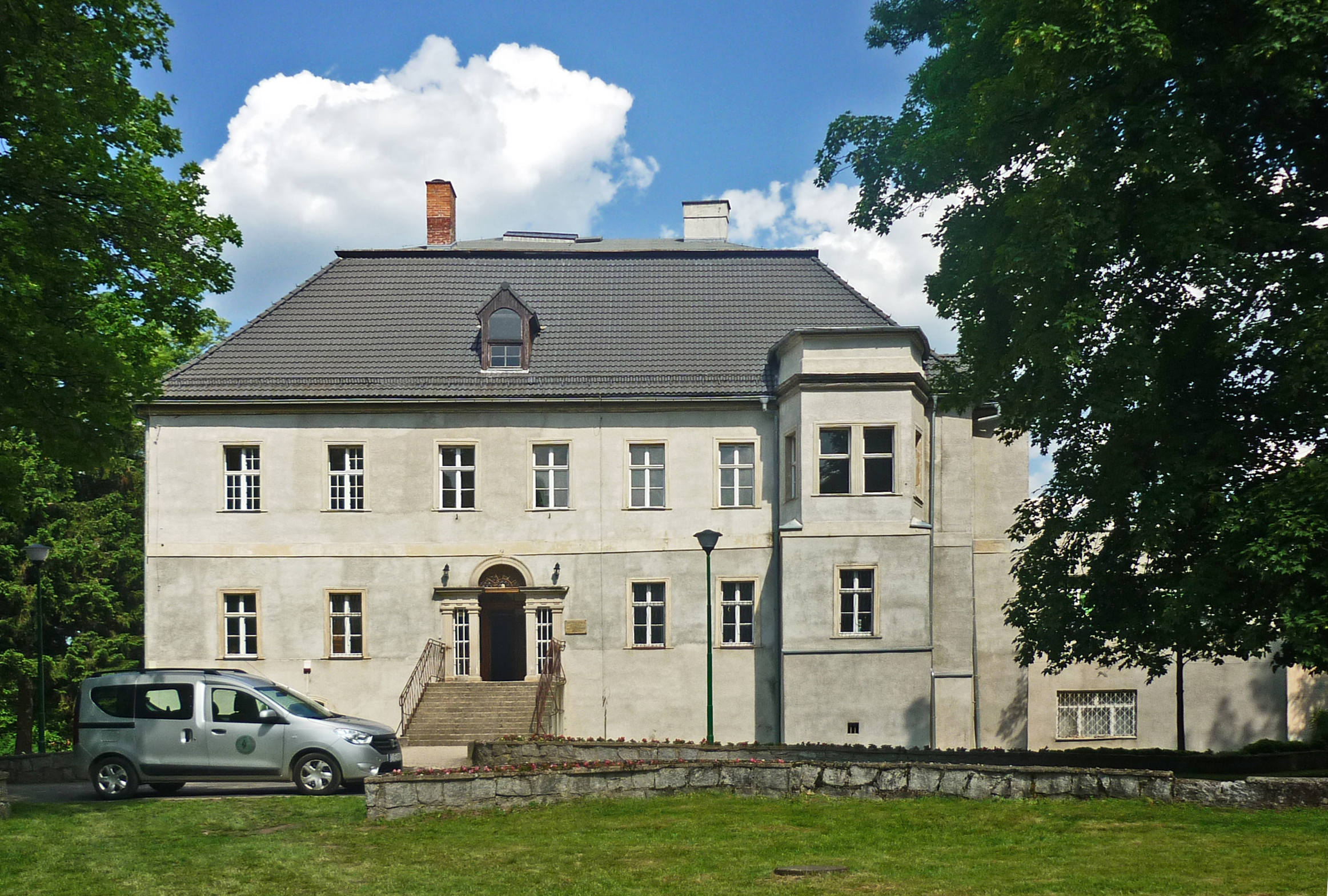 Schloss Buchwald (Bukowiec) im Riesengebirge